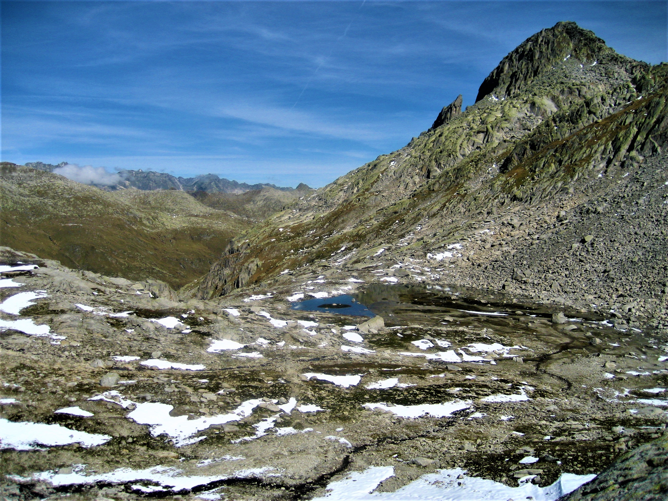 Lucendropass auf der Urnerseite